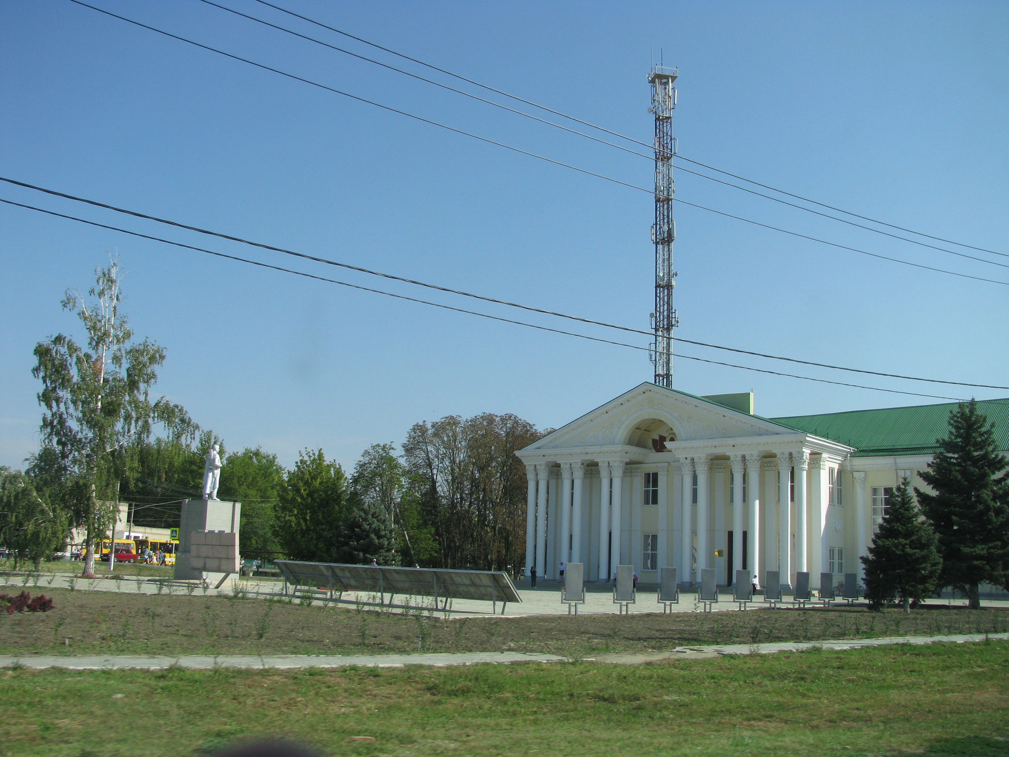 Трудобеликовский Дом Культуры (ул.Ленина, 101)